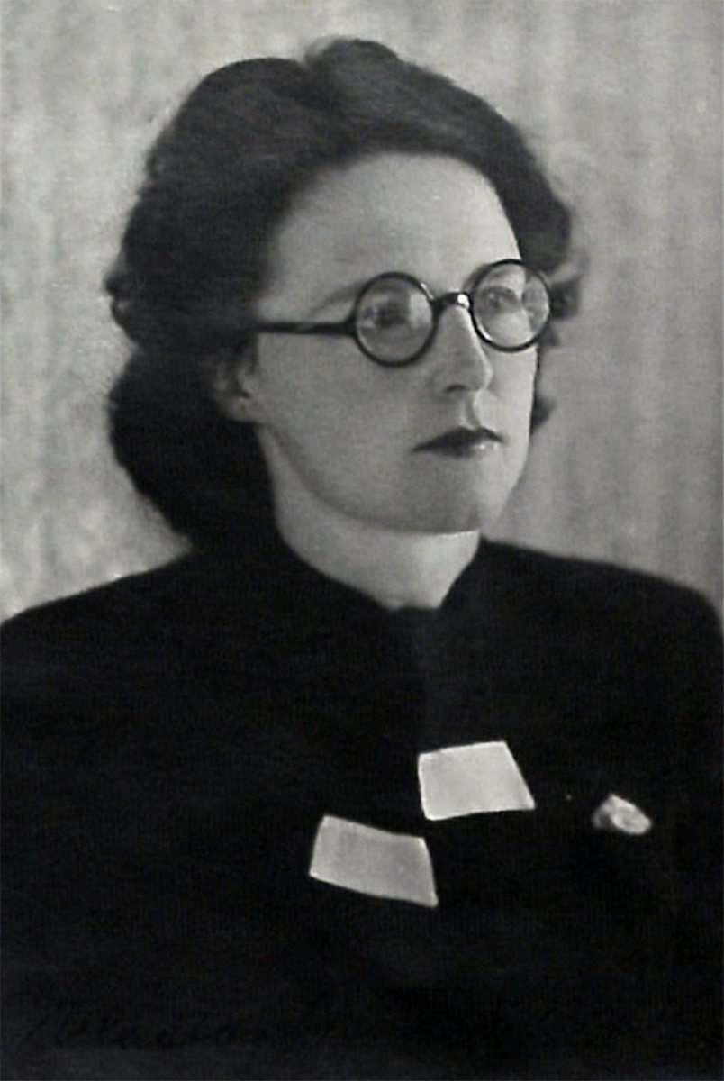 Irena Bernášková (* 1904 Praha – 1942 Berlín) - rozená Preissigová - česká novinářka a odbojářka (známa také jako "Inka Bernášková"). Za druhé světové války položila svůj život v boji proti německé okupaci. Vydavatelka tzv. spořilovské mutace ilegálního časopisu "V boj". Fotografie z falešné protektorátní všeobecné občanské legitimace vedené na jméno Vlasta Nováková.